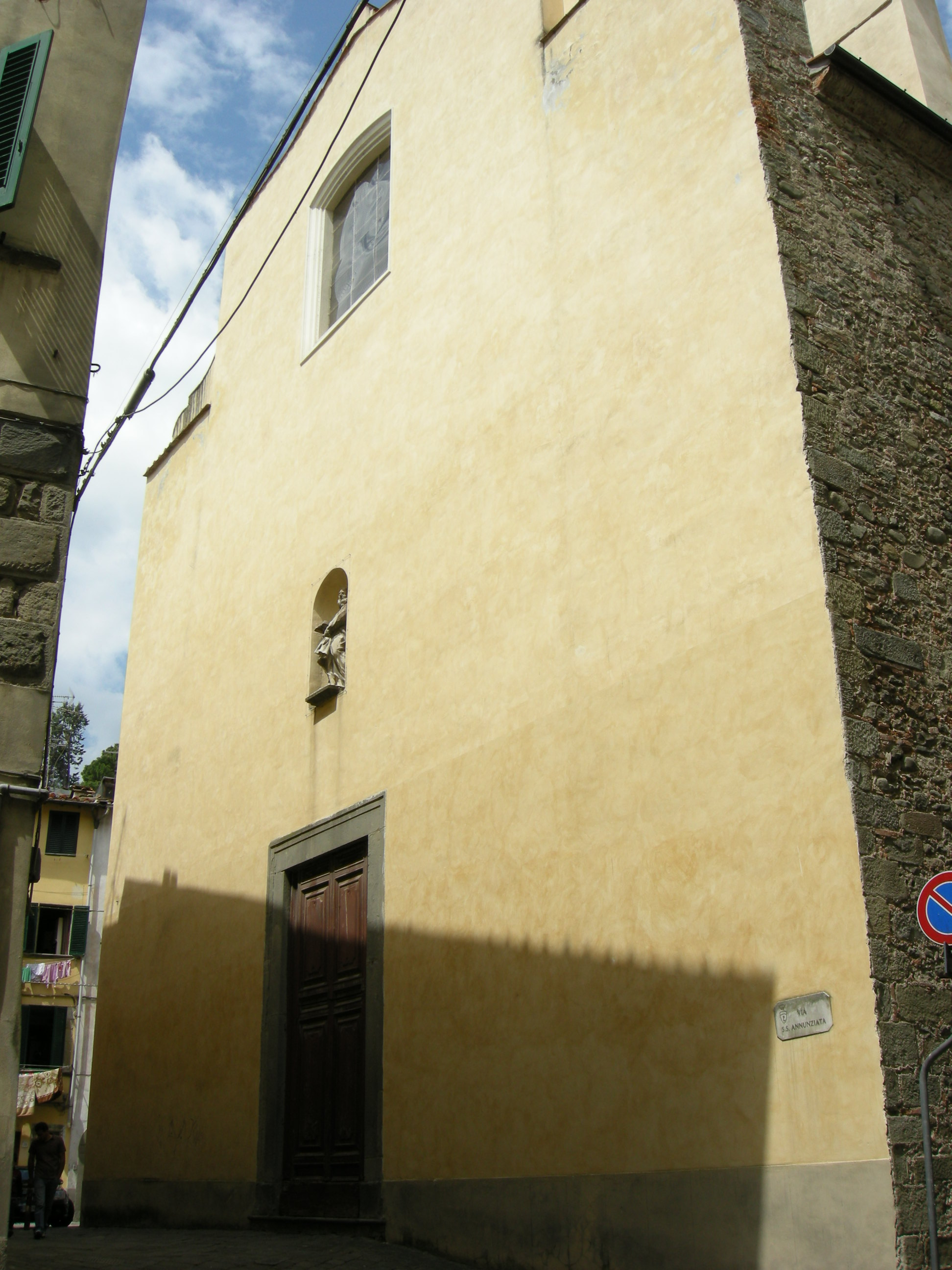 Santissima annunziata pescia